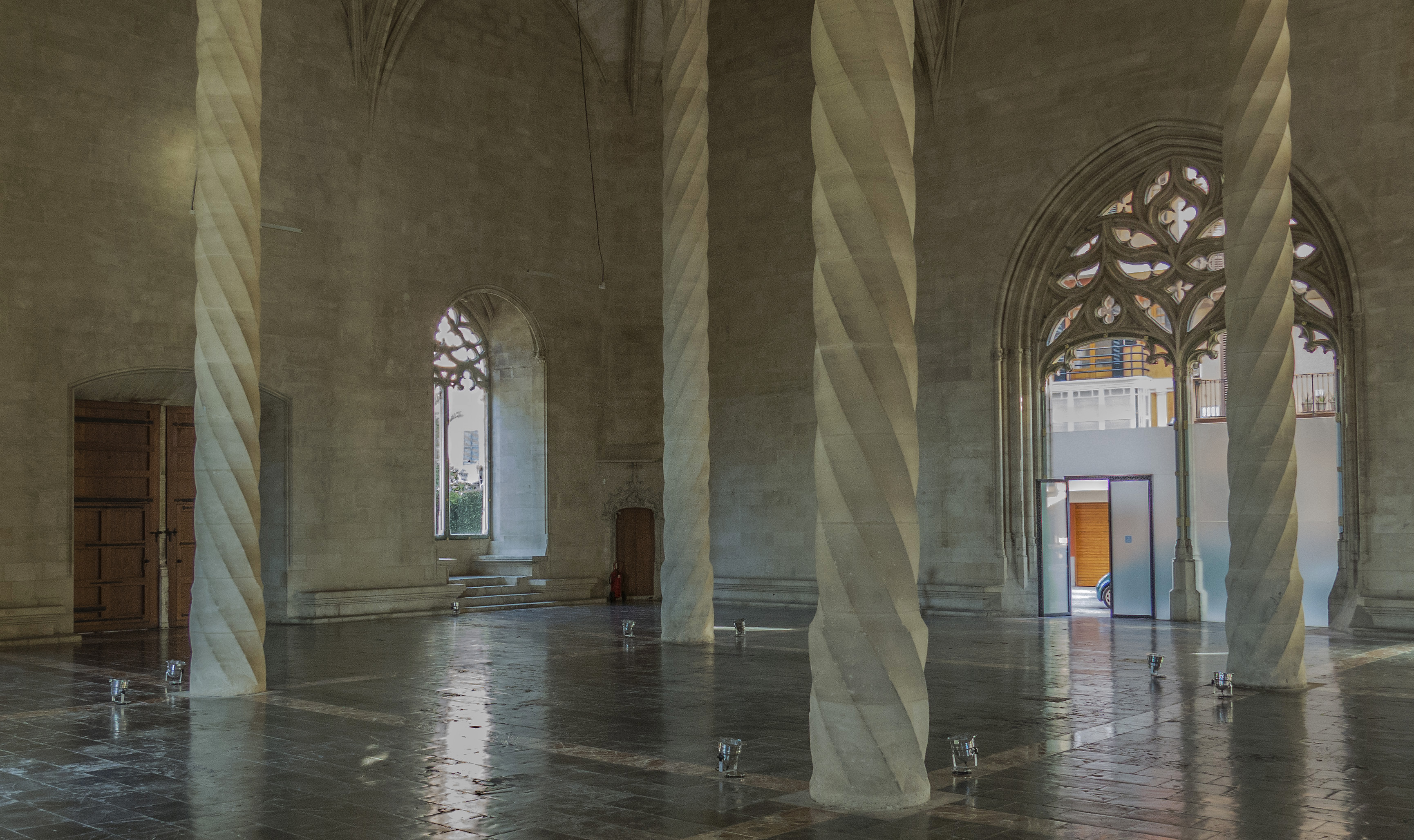 La Llotja dels Mercaders de Palma fou construïda per Guillem Sagrera entre 1426 i 1447